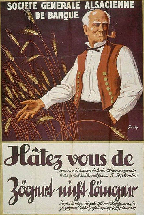 Société Générale Alsacienne de Banque. Hâtez-vous de souscrire à l'émission de Rentes 4%, 1925 avec garantie de change dont la clôture est fixée au 5 Septembre. Bibliothèque nationale et universitaire de Strasbourg